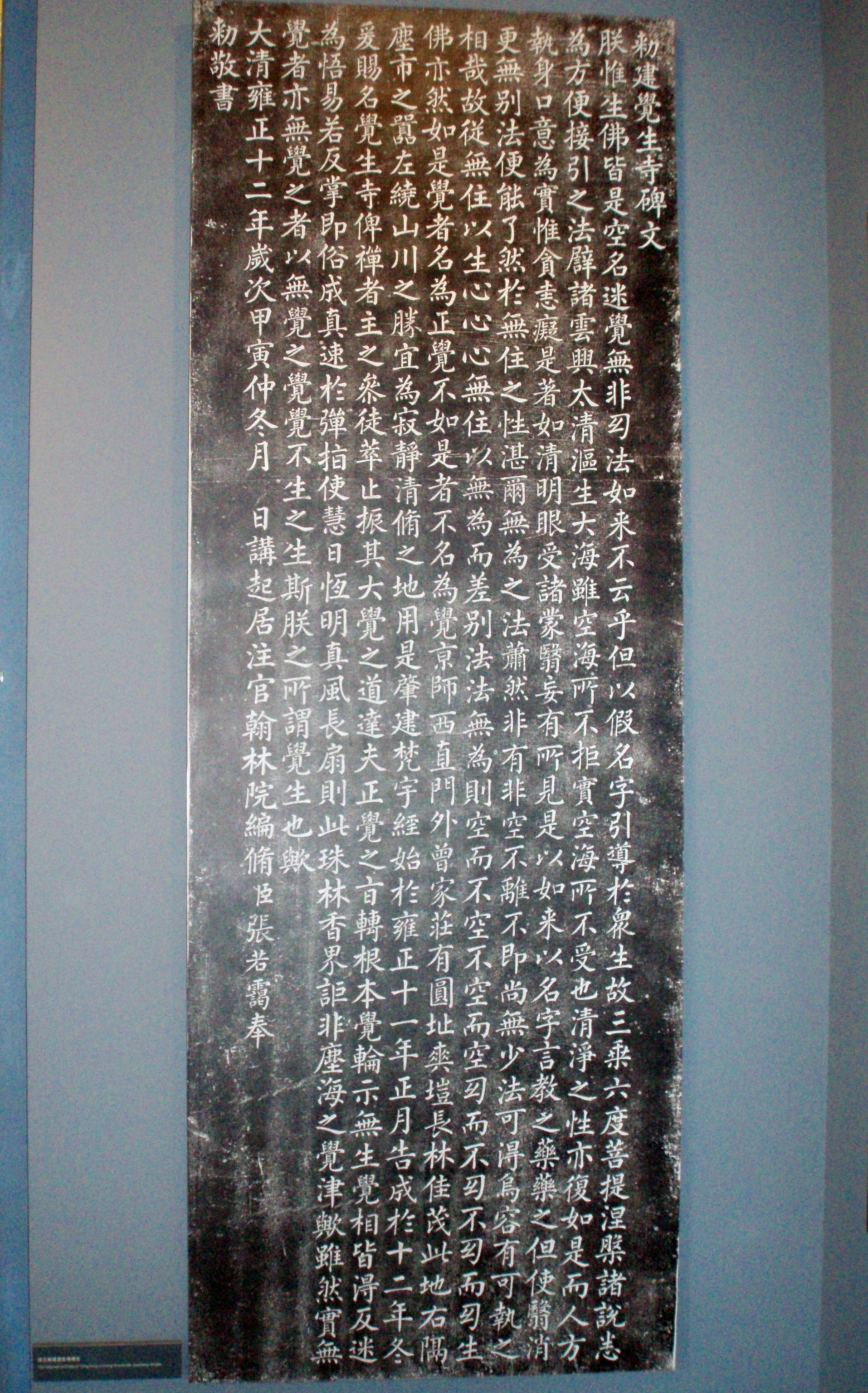 北京覺生寺《敕建覺生寺碑文》拓本